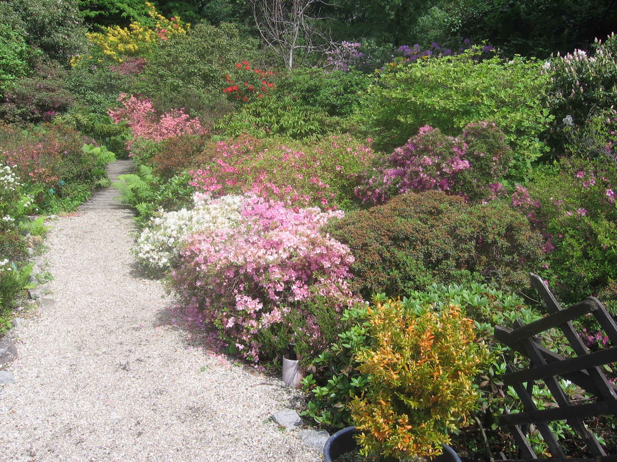 autor: Vladaig my photo